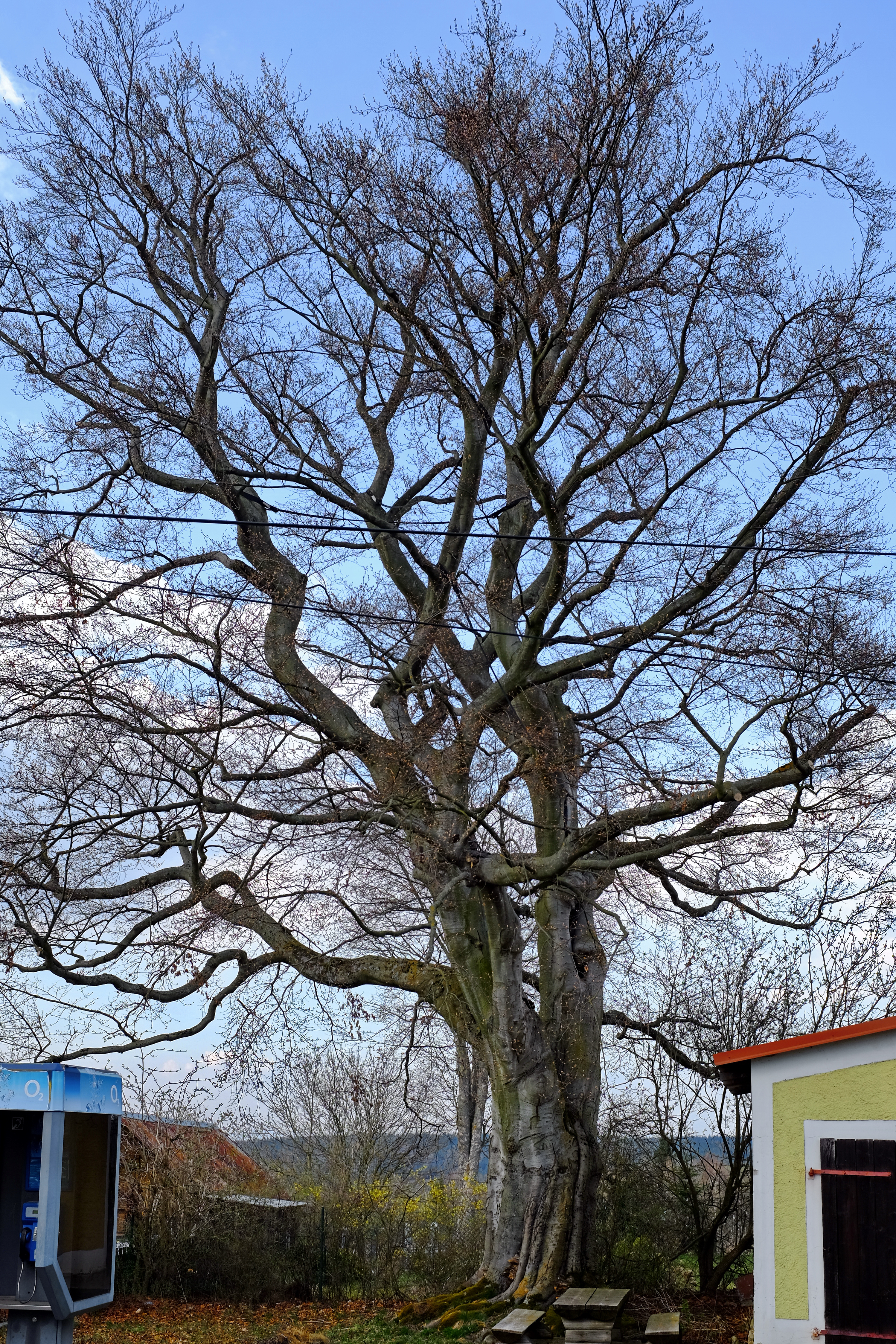 Památný strom - Chodovský buk - Chodov (okres Karlovy Vary)